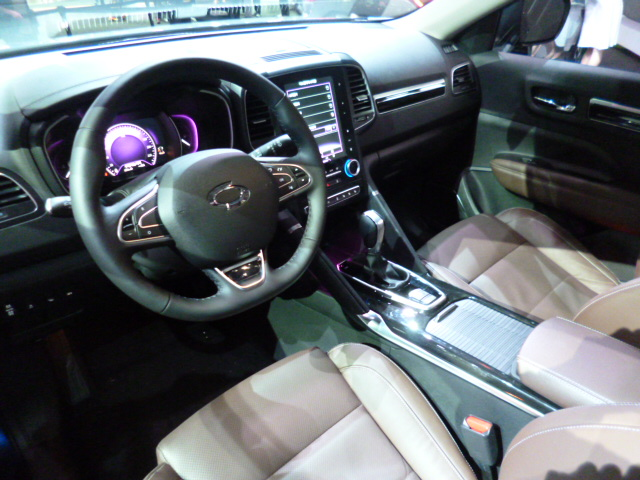 ルノーサムスン・QM6